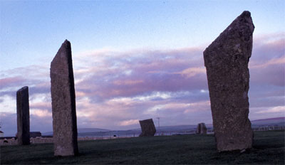 Stones of Stenness, Orkney